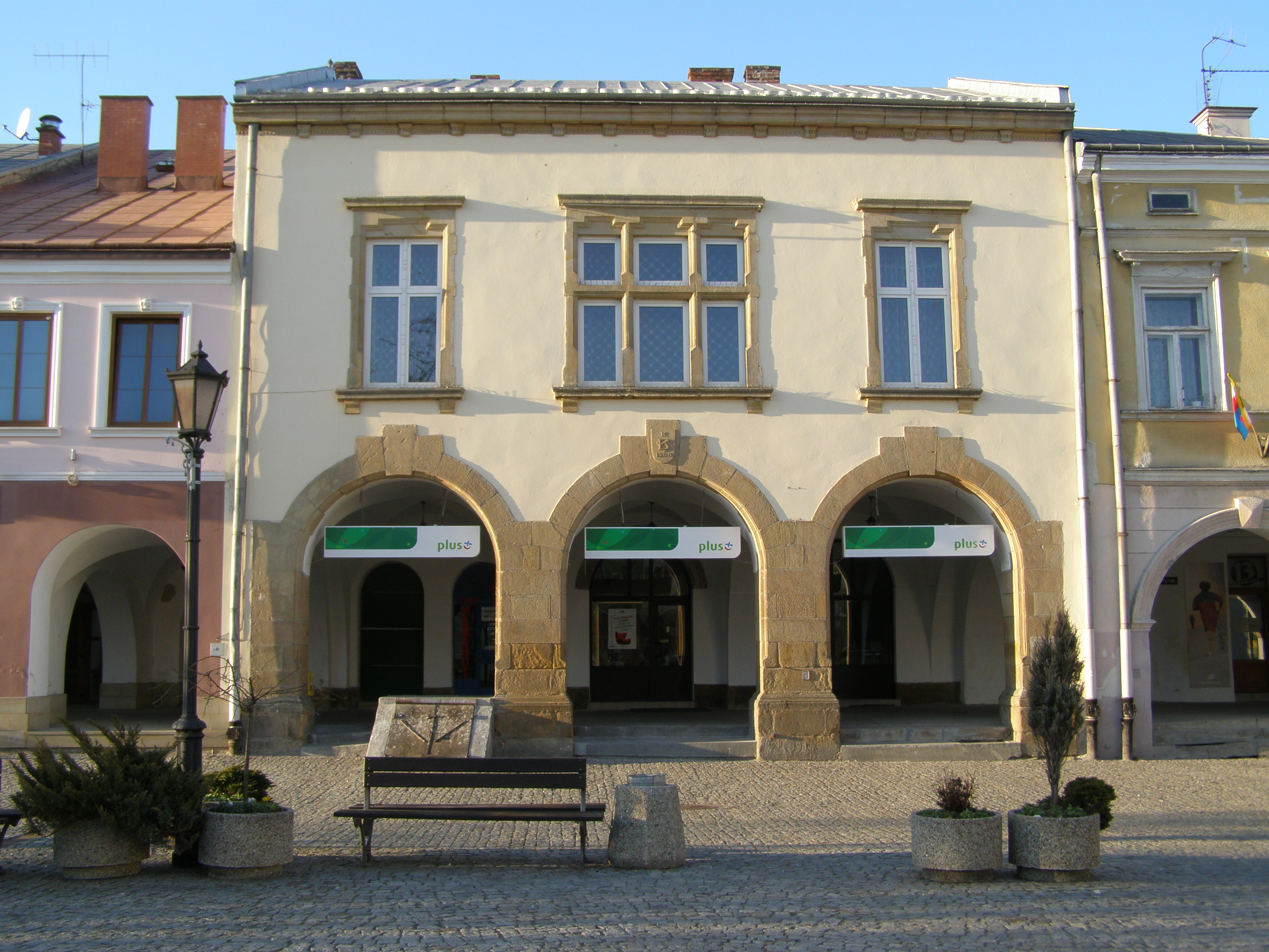 Krosno. Dom W. R. Portiusa - Rynek 27 10.1982.